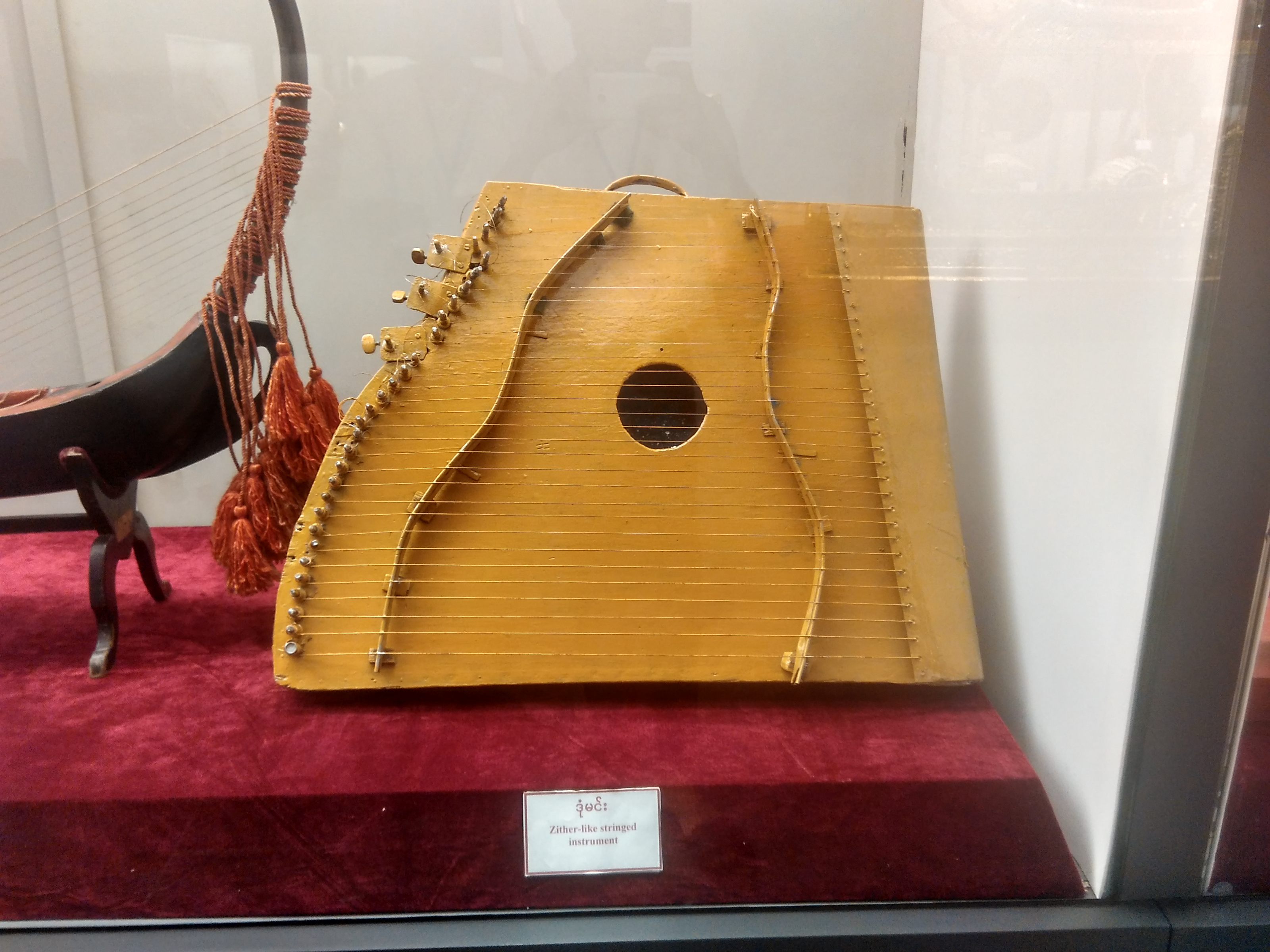 မြန်မာ့တူရိယာ ဒုံမင်း